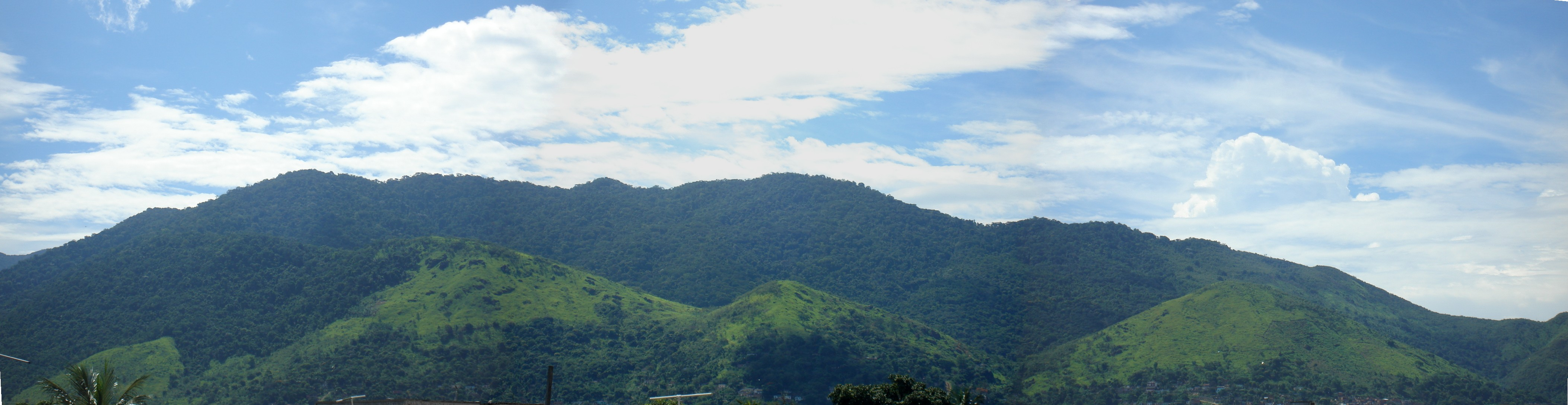 Gericinó mountain, Brazil